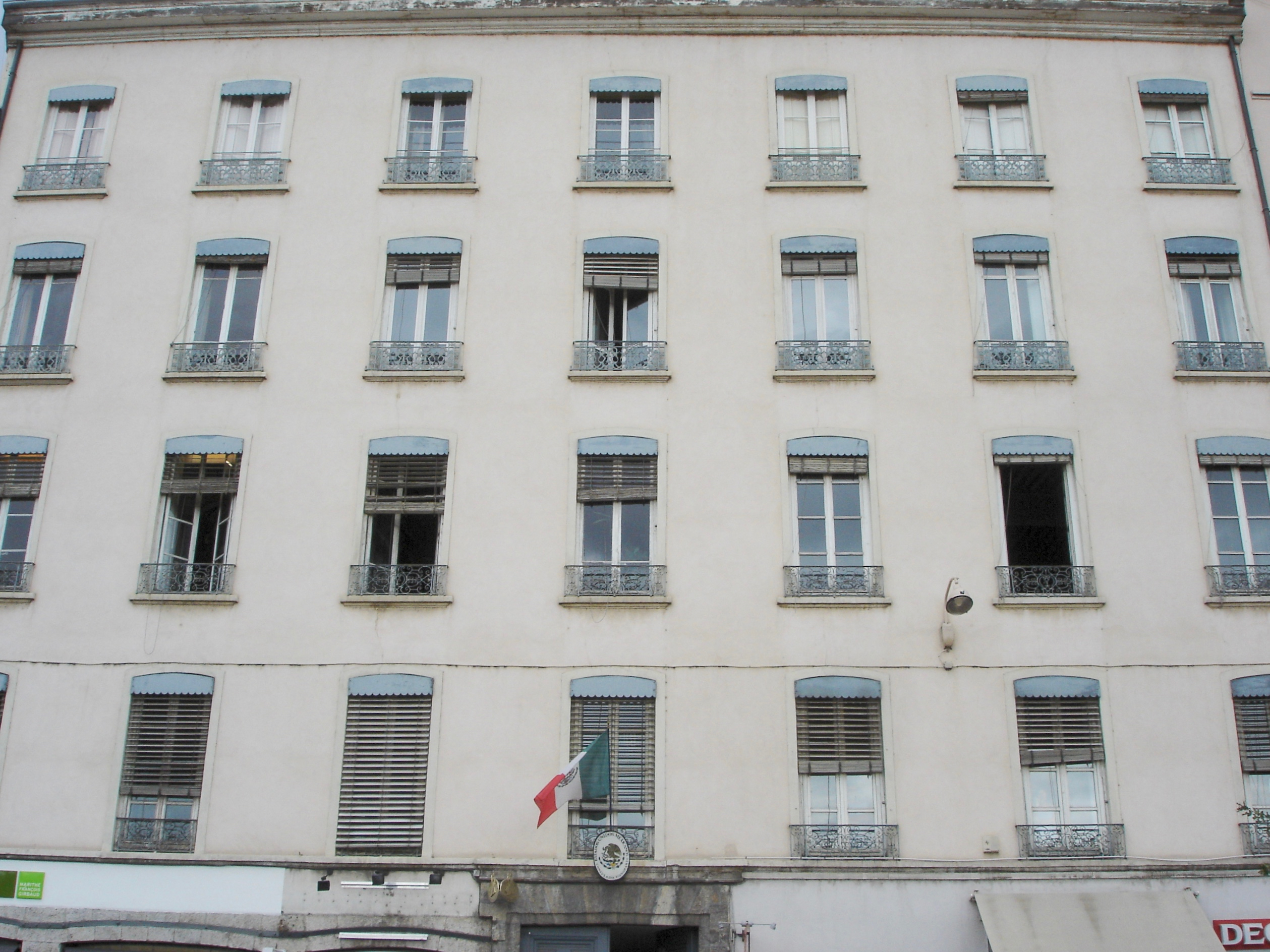 Façade du 6, place Bellecour à Lyon en France.